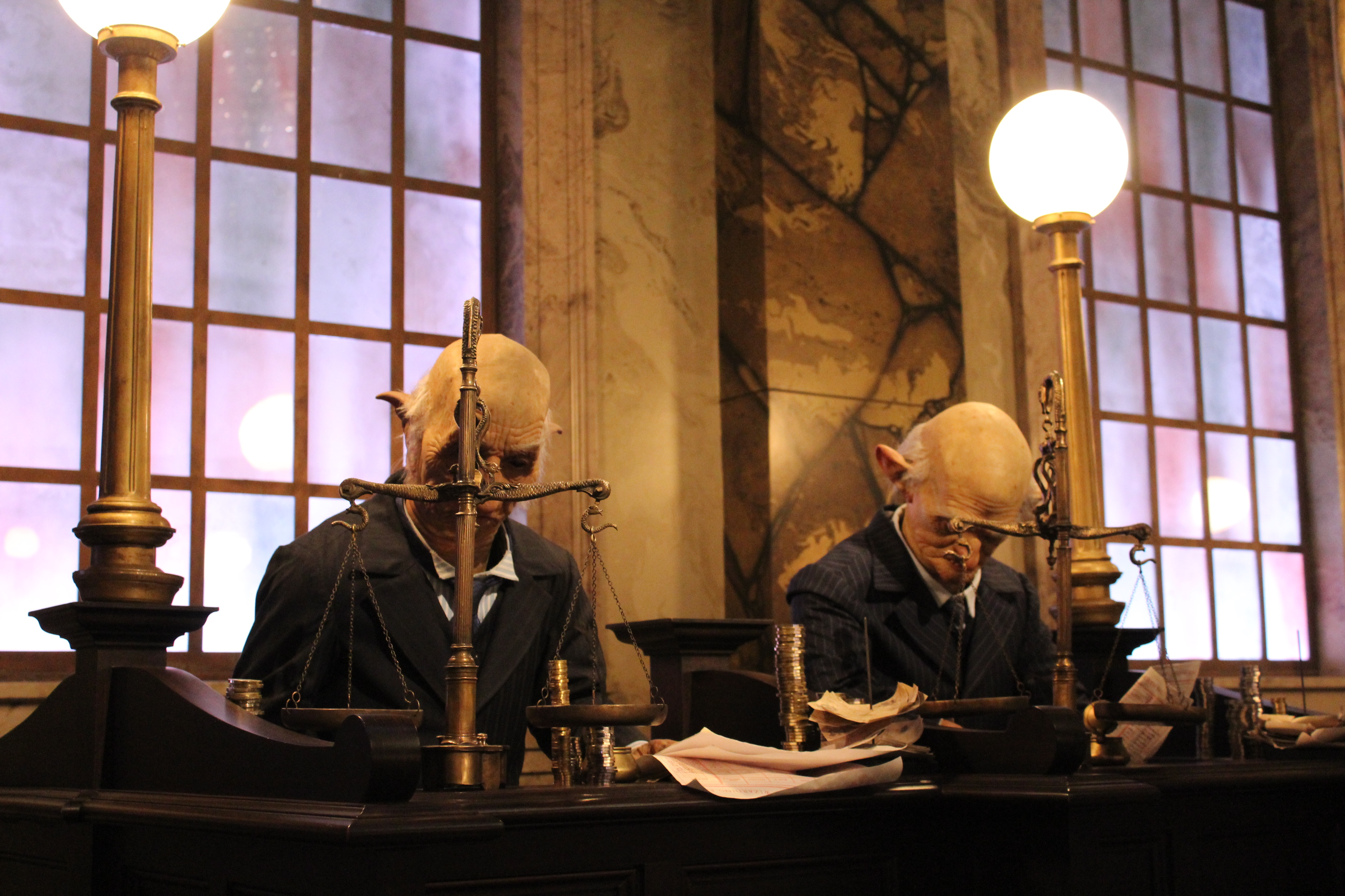 Universal Studios Florida